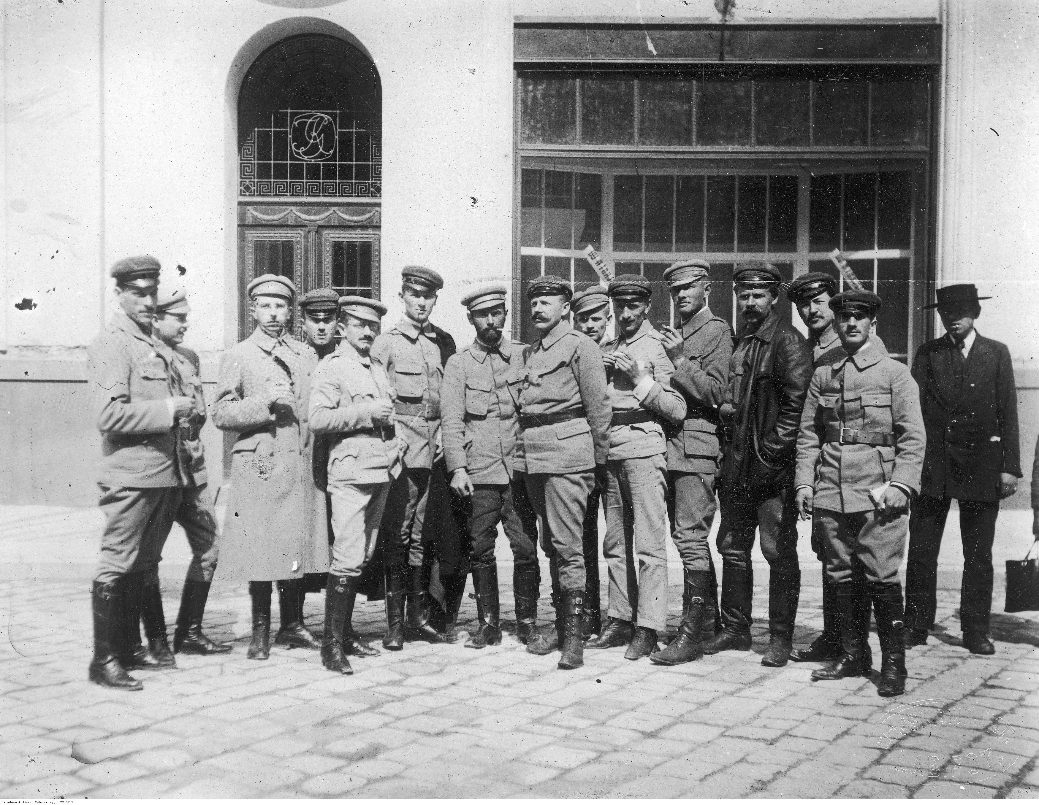 Fotografia grupowa. Stoją od lewej: Mikołaj Sarmat-Szyszłowski, Stanisław Sawa-Machowicz, Adam "Witold" Koc, NN, Stanisław Cavour-Urbański, Tadeusz Wyrwa-Furgalski, Edward Śmigły-Rydz, Wacław Aleksandrowicz, Zygmunt Langman, Jerzy Roja-Śladki, Bogdan Kordian-Kunc, Kostek Aleksandrowicz, Tadeusz Kuczyński, NN.